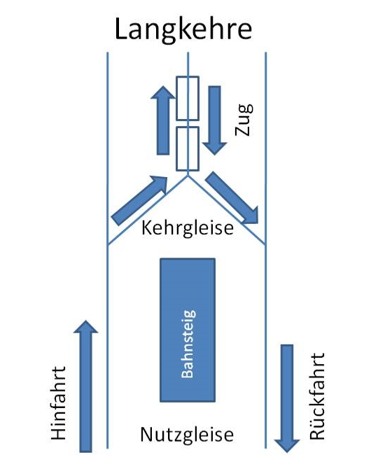 Langkehre im Bahnverkehr